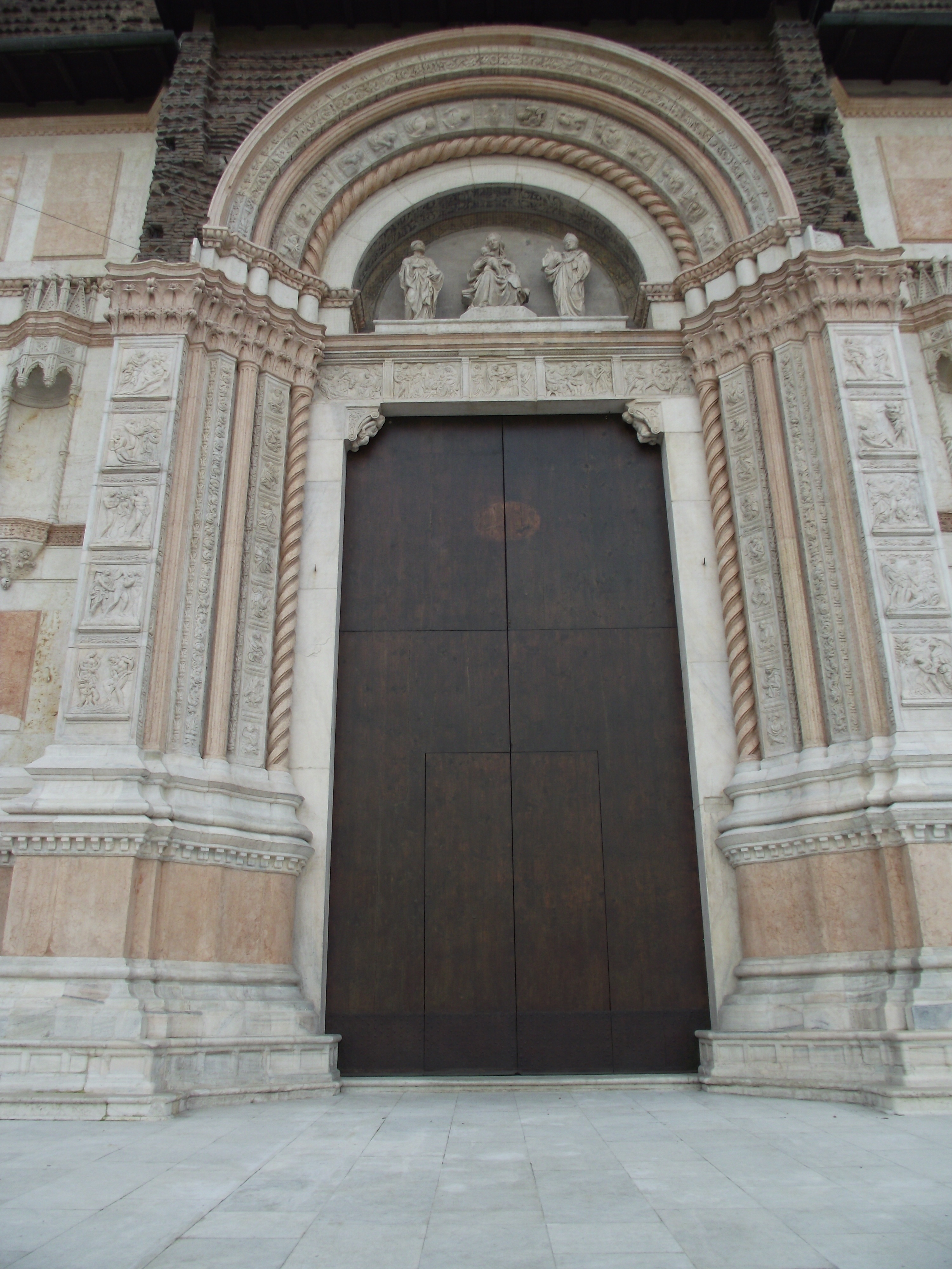 Bologna, Basilica di San Petronio, 1390-XVII secolo